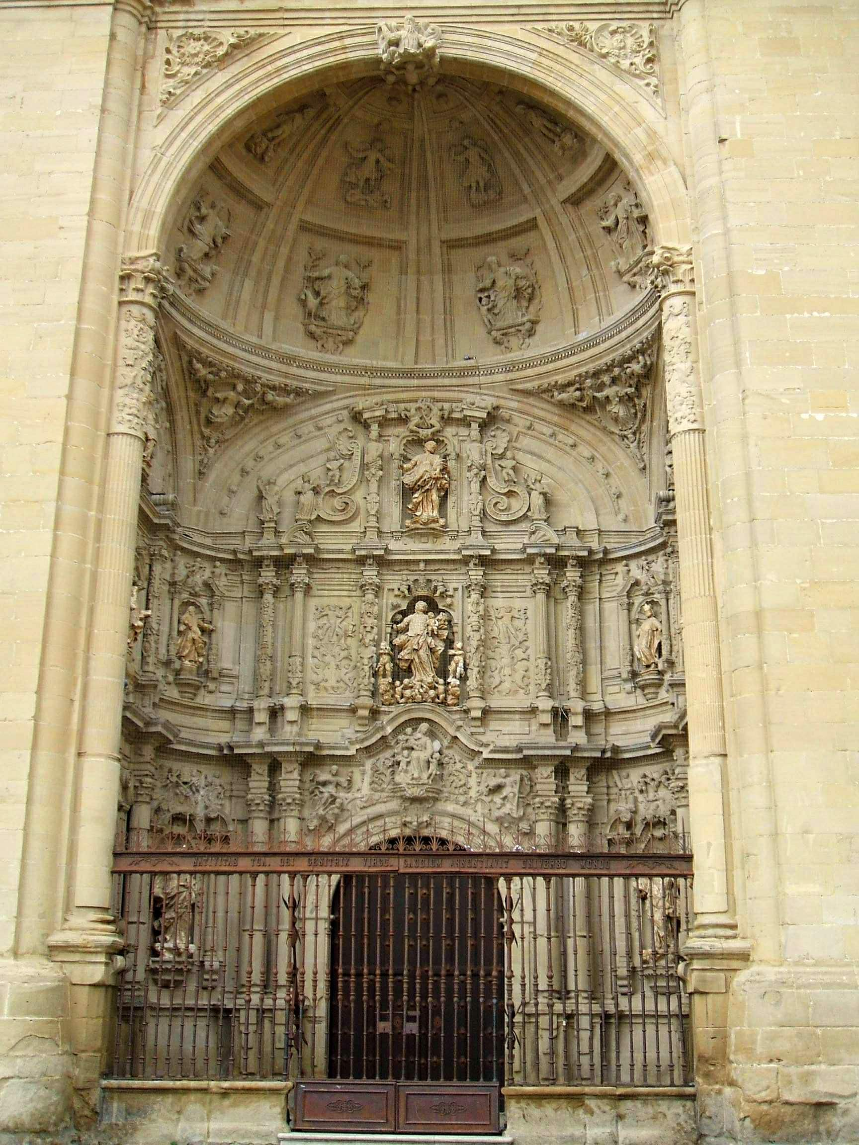 Catedral de Santa María la Redonda, Logroño (La Rioja). Portada principal